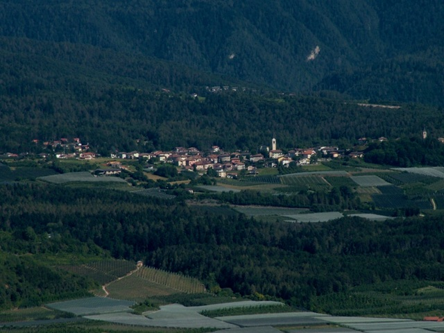 Panorama del paese di Tres, fotografato da ovest